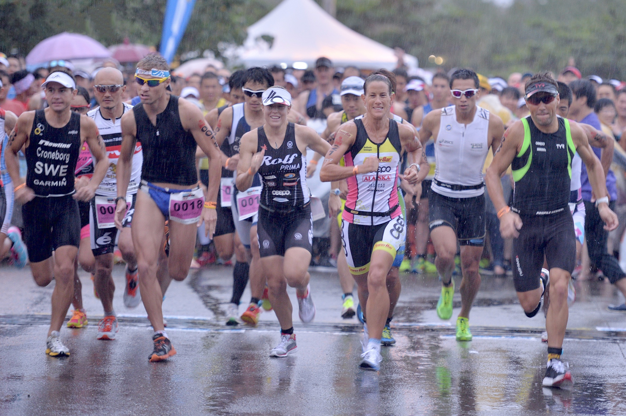 Start at 2013 Ironman 70.3 Taiwan